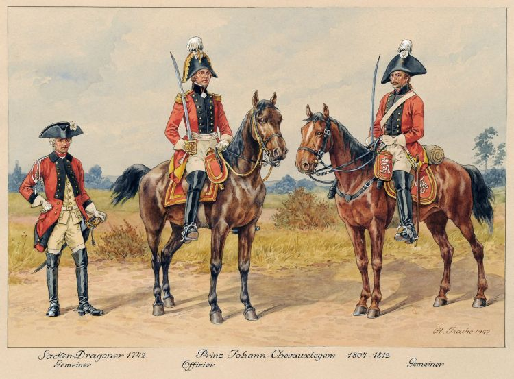 Uniformstudie sächsischer Soldaten - Dragoner, Offizier und Grenadier